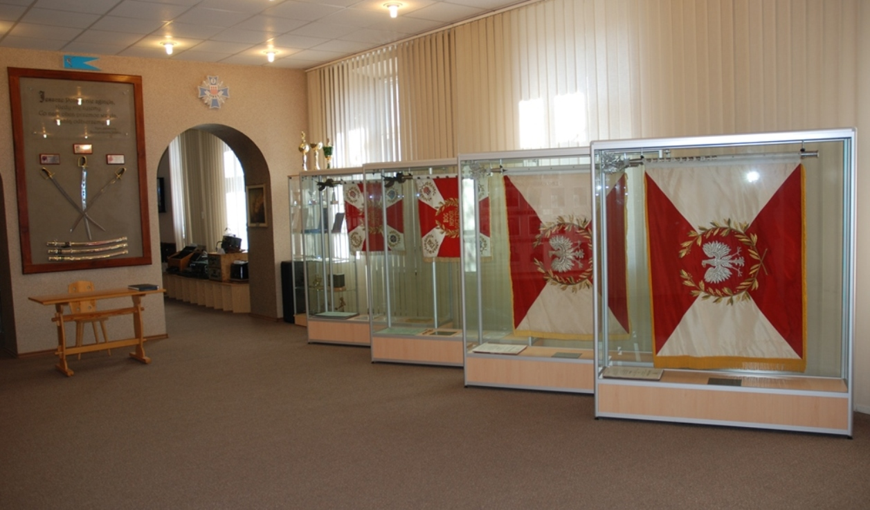 Sala tradycji 2 Orel, sztandary.